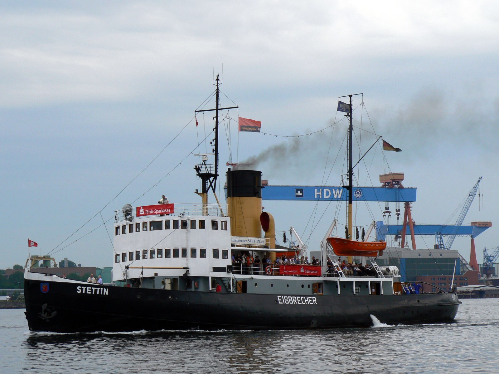 Dampfeisbrecher Stettin auf der Kieler Woche 2007.